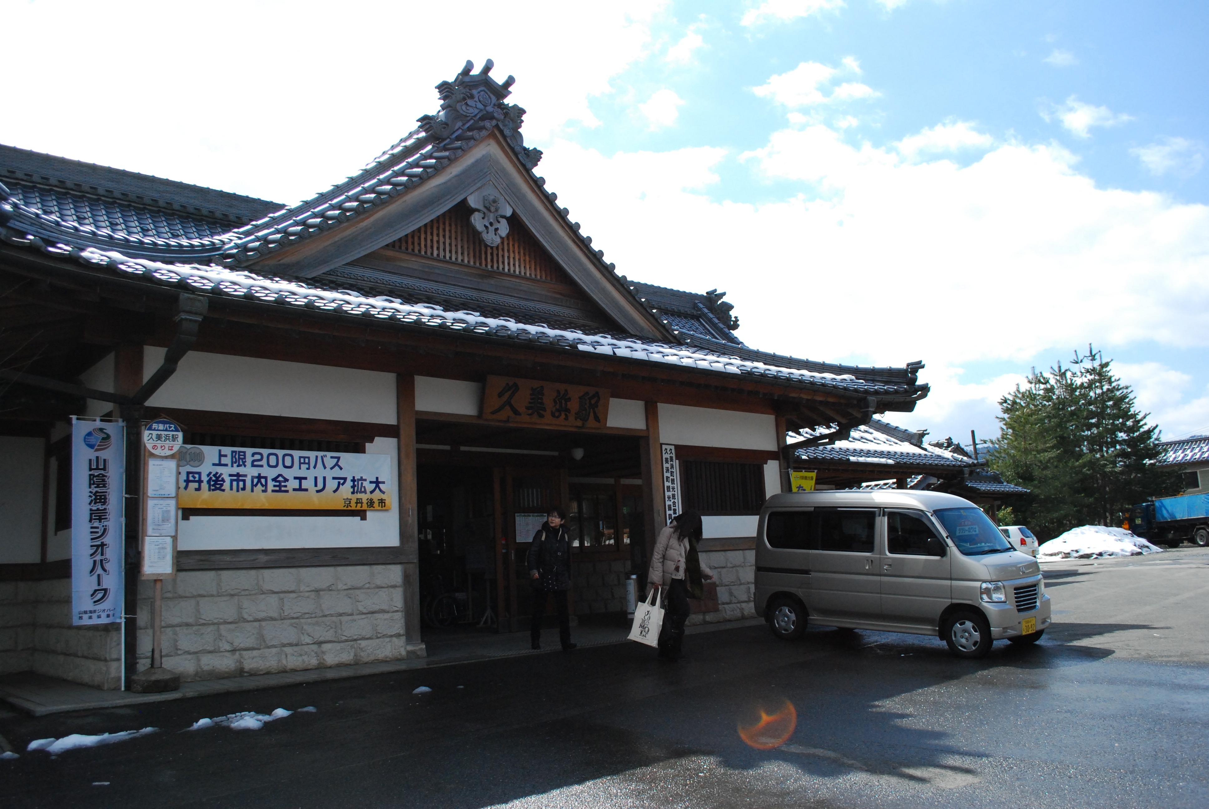 久美浜駅